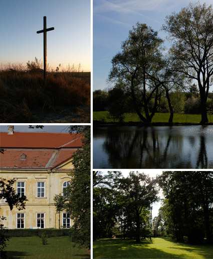 Obec Dukovany